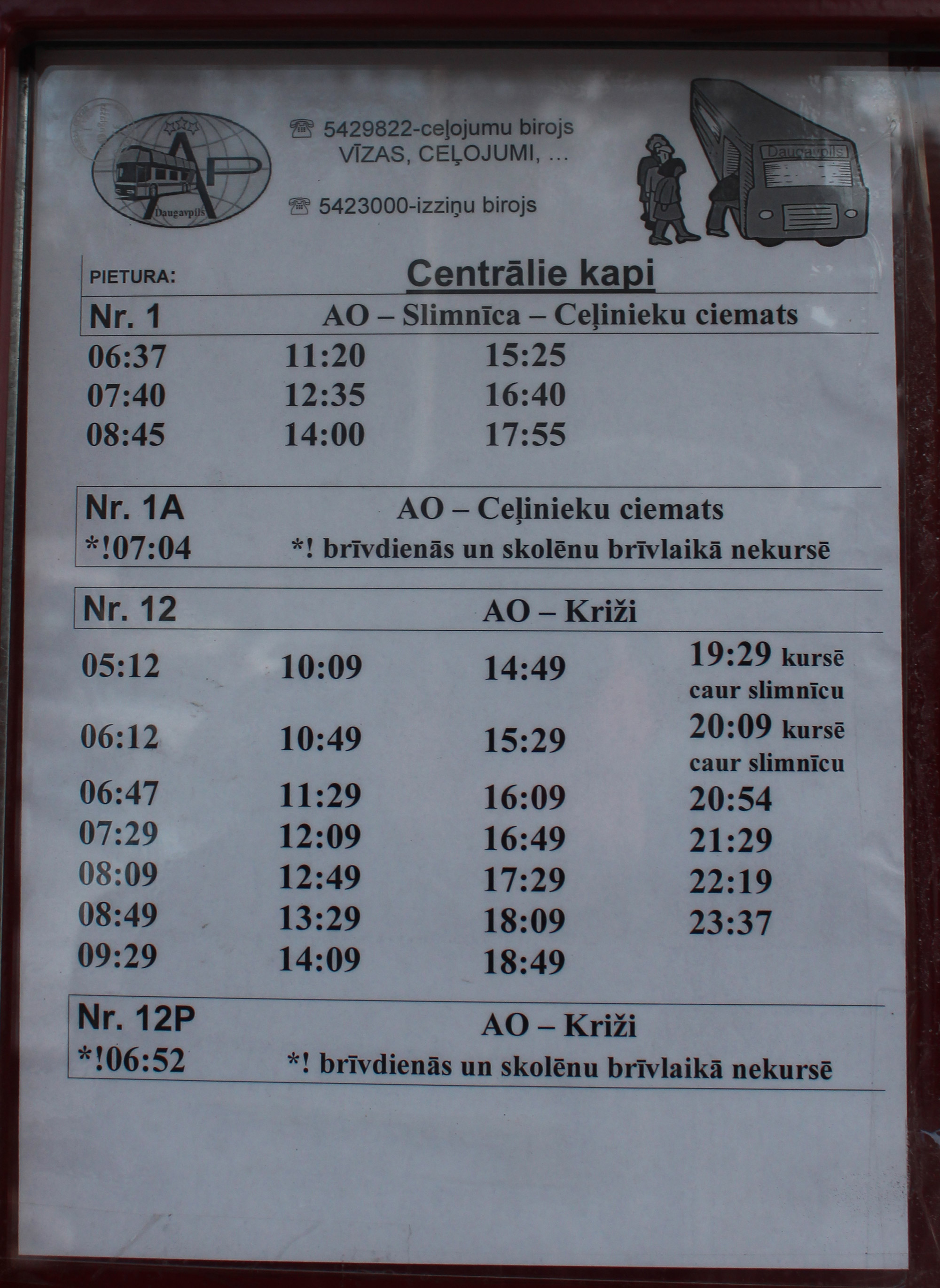 1; 1A; 12; 12P autobusu saraksts pieturā "Centrālie kapi"